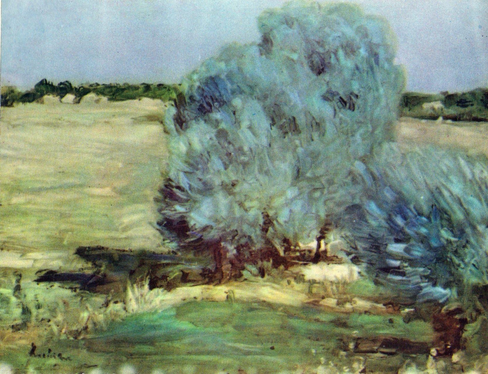 Ştefan Luchian - Sălciile de la Chiajna, Muzeul Naţional de Artă din Cluj